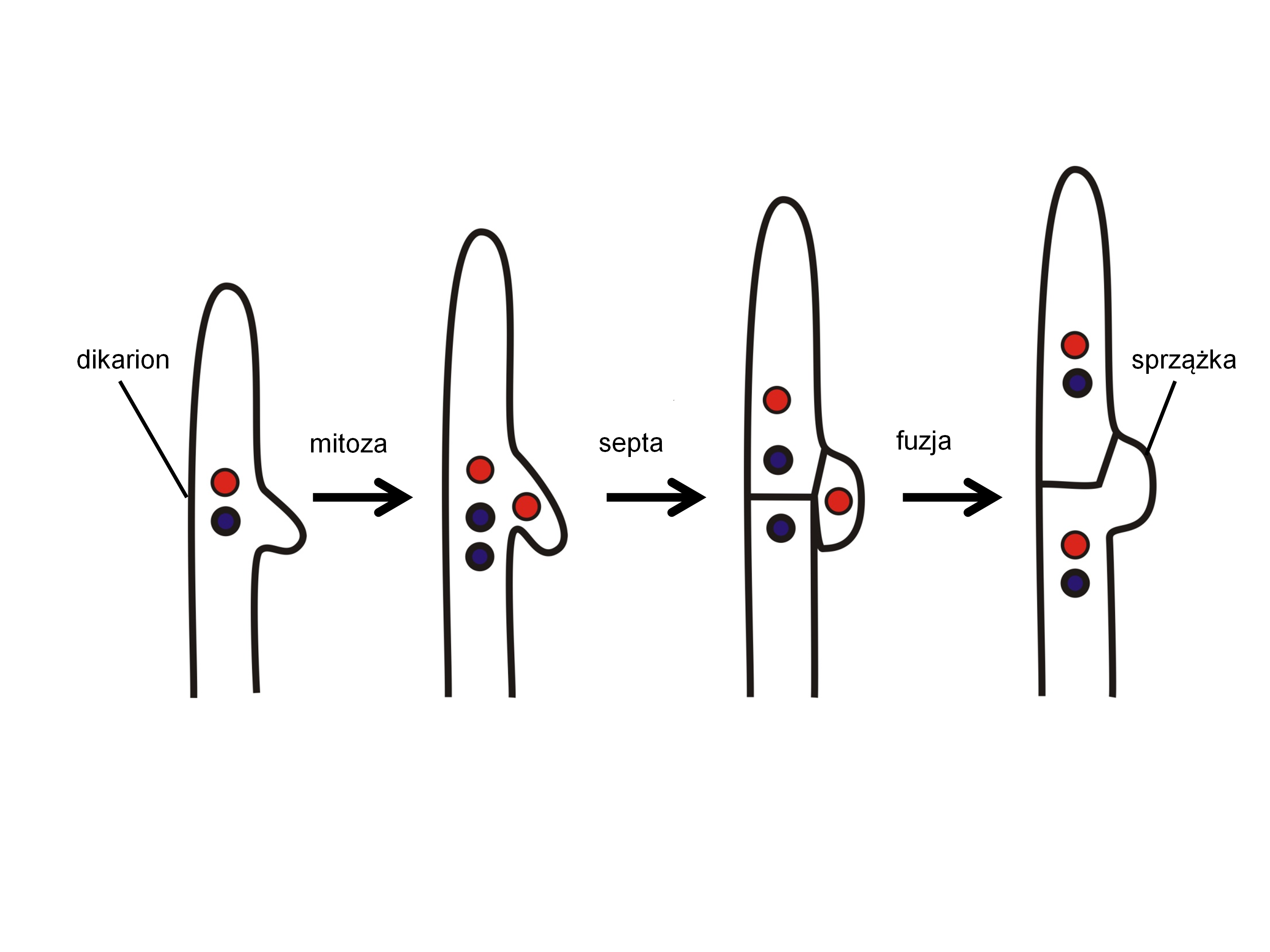 Development of clamp connection